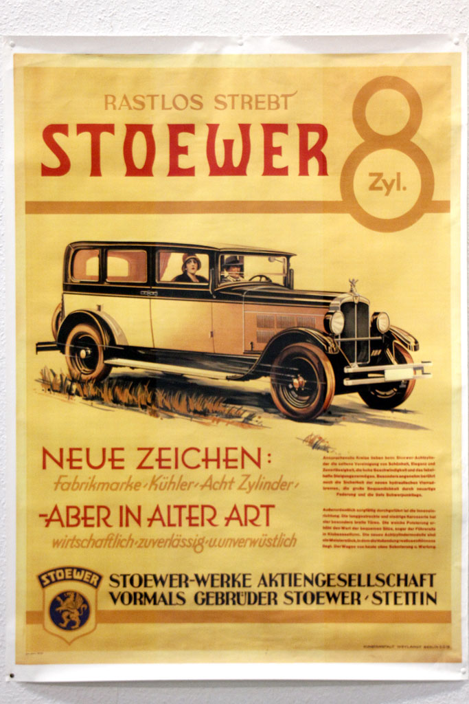 1939 Stoewer Plakat2_IMG_2865.JPG